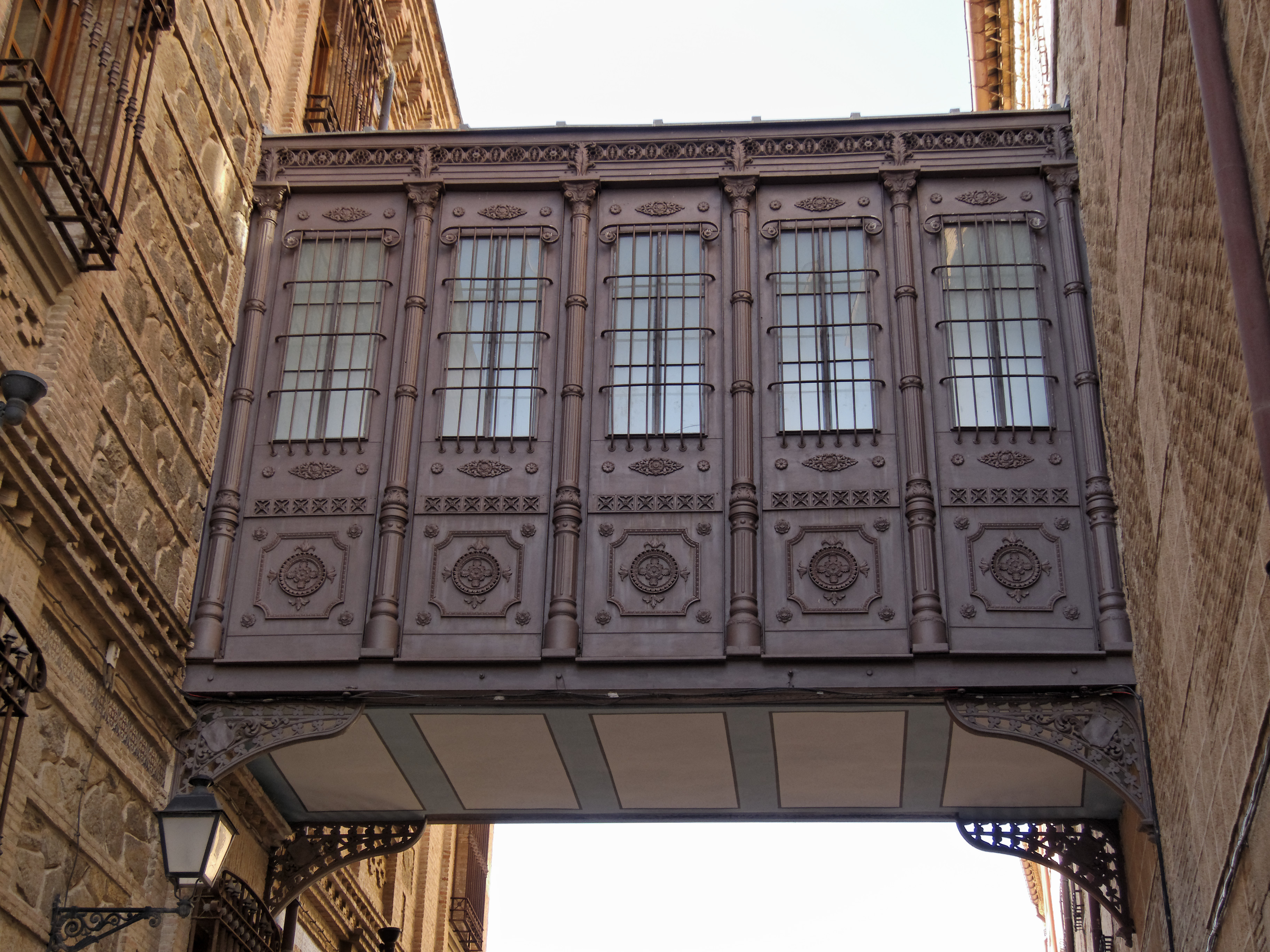 Real Colegio de Doncellas Nobles, toledo. Pasaje elevado sobre la Calle del Colegio Doncellas que comunica el edificio primitivo con la ampliación.